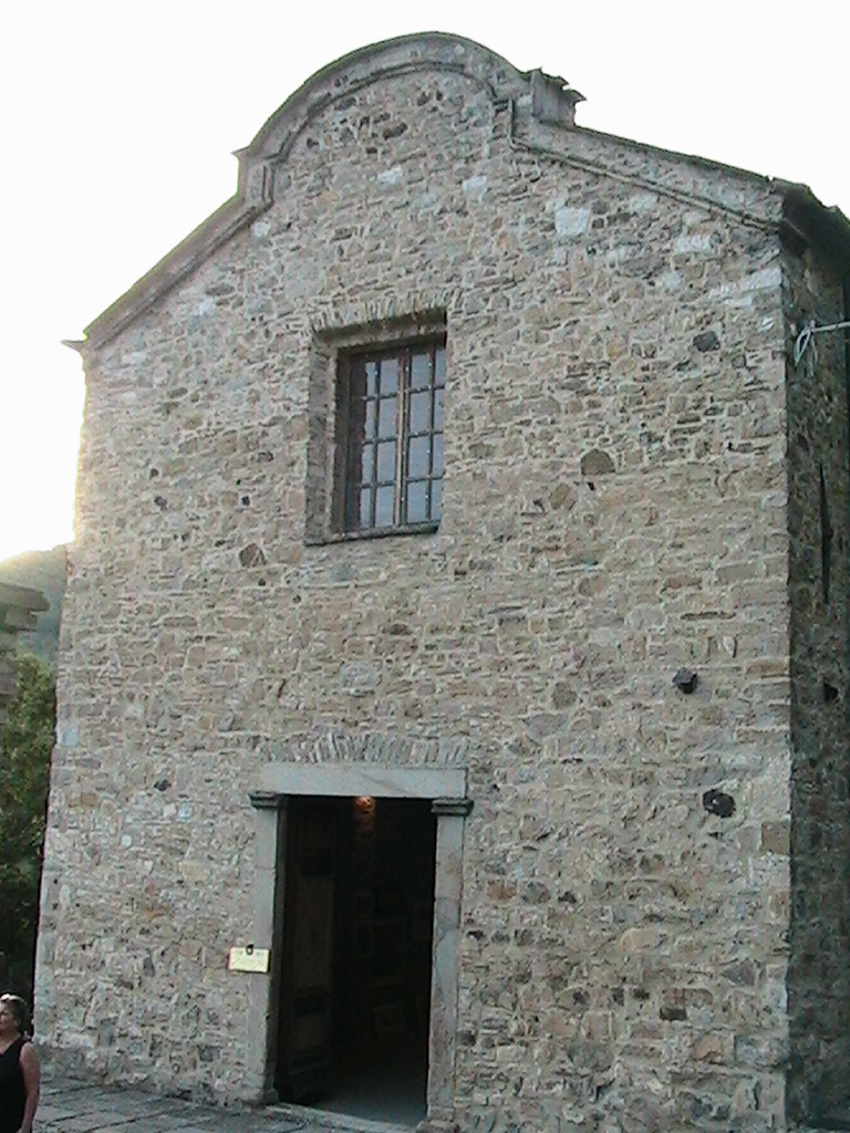 Bardi - Chiesa di San Francesco